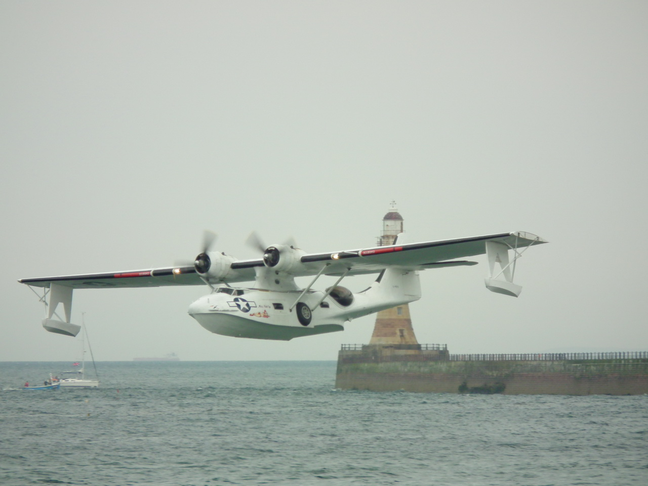 Catalina